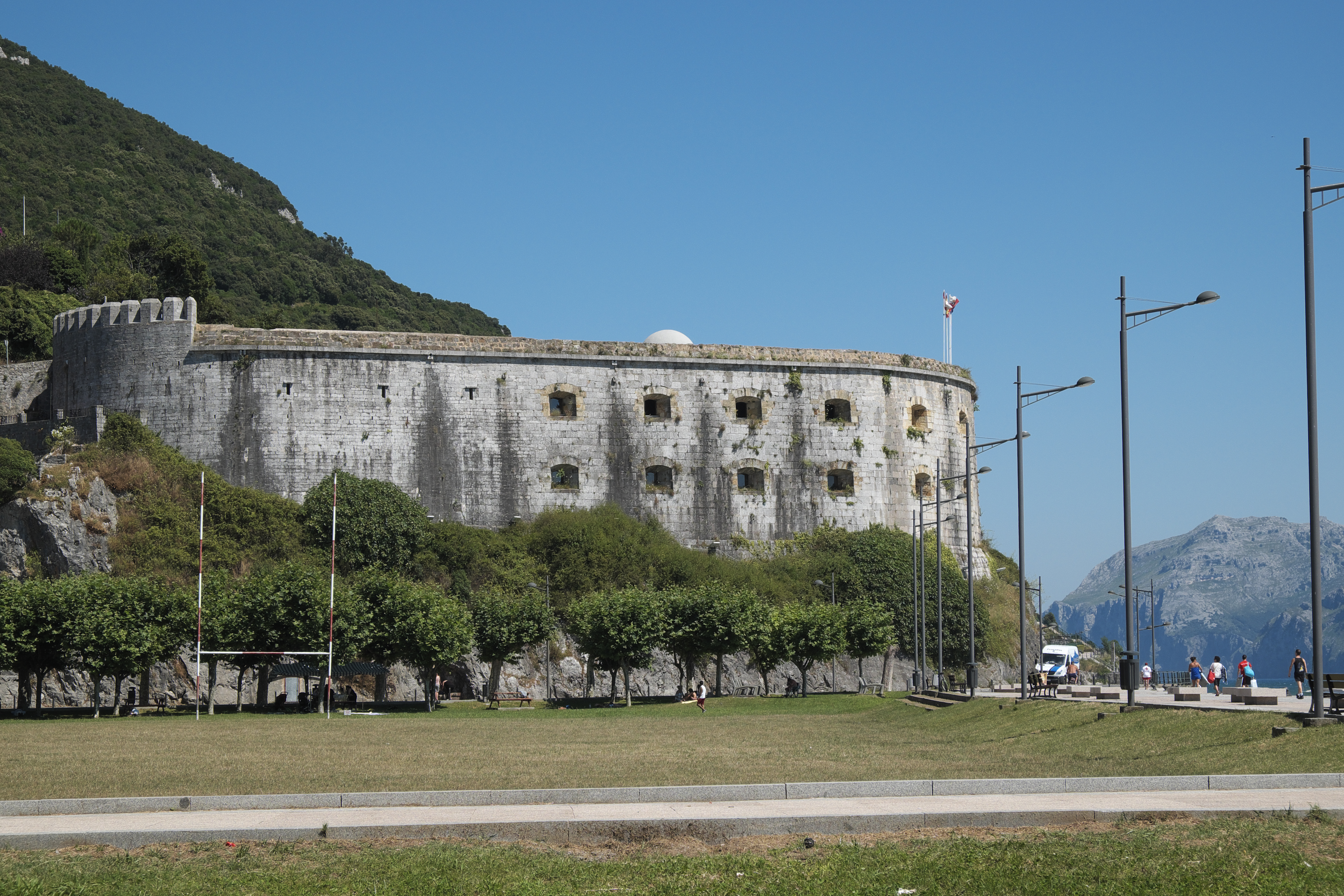 Fort San Martín in Santoña (Kantabrien/Spanien)